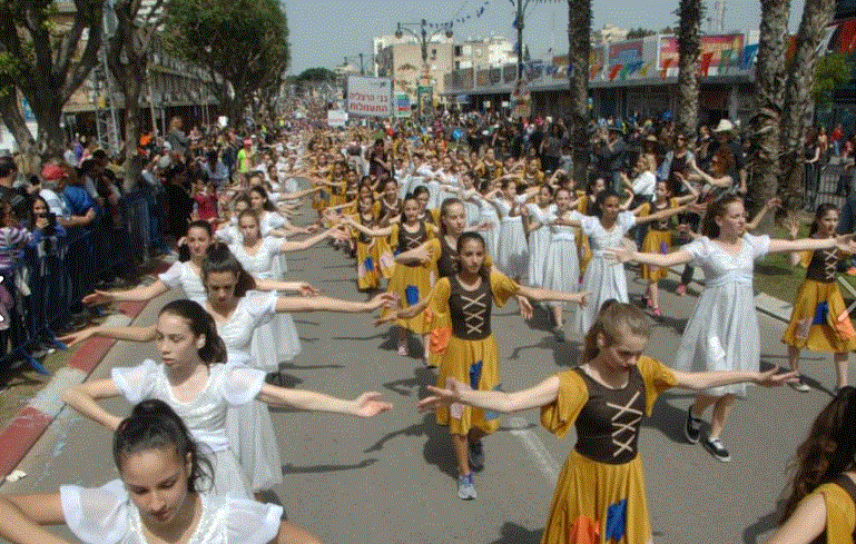 עדלאידע 2014 הרצליה